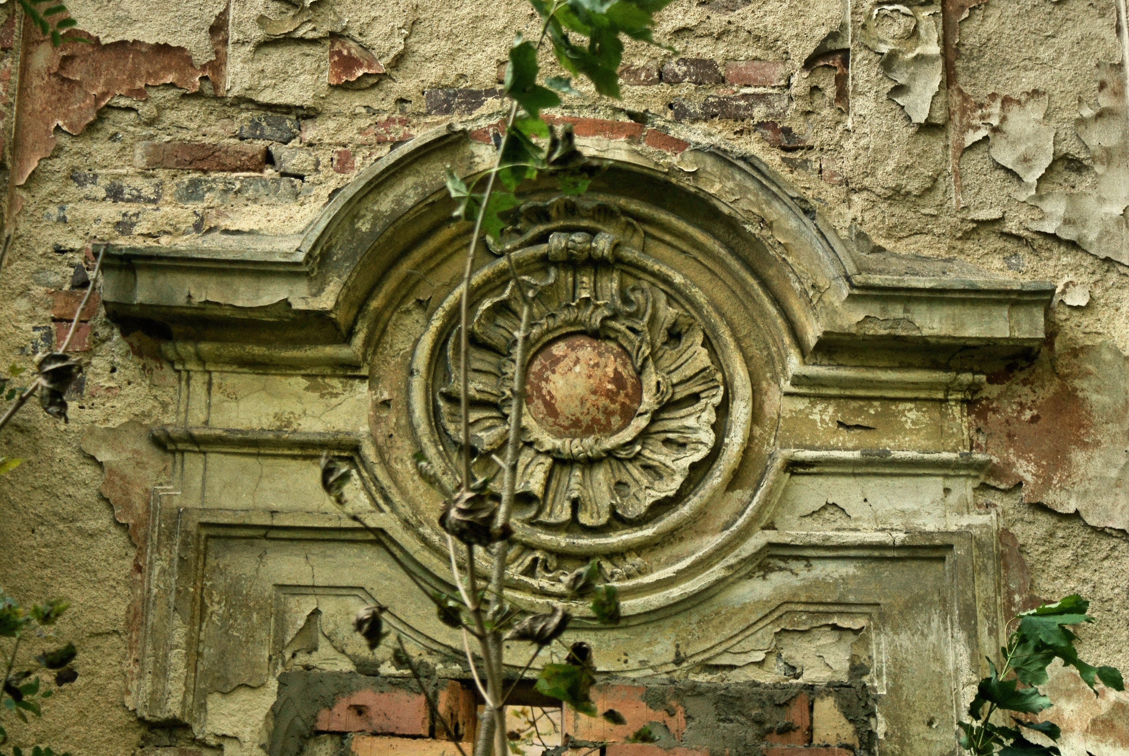 Parchów - pałac w ruinie (zabytek nr A/3221/956 z dn. 4.10.1961)